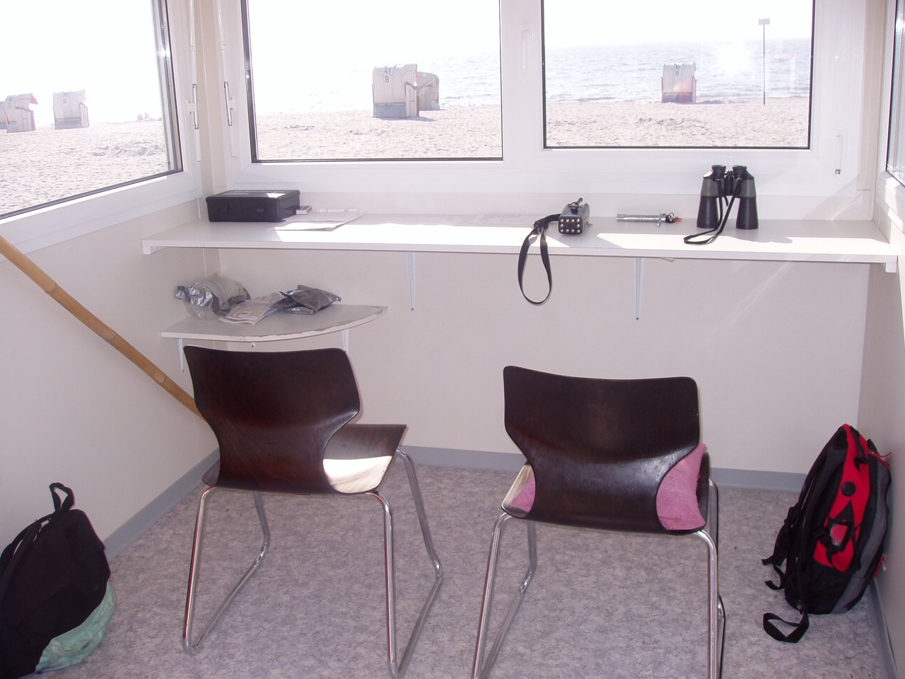 Innenansicht eines Wachturm der DLRG mit Fernglas, EH-Kasten und Funkgerät